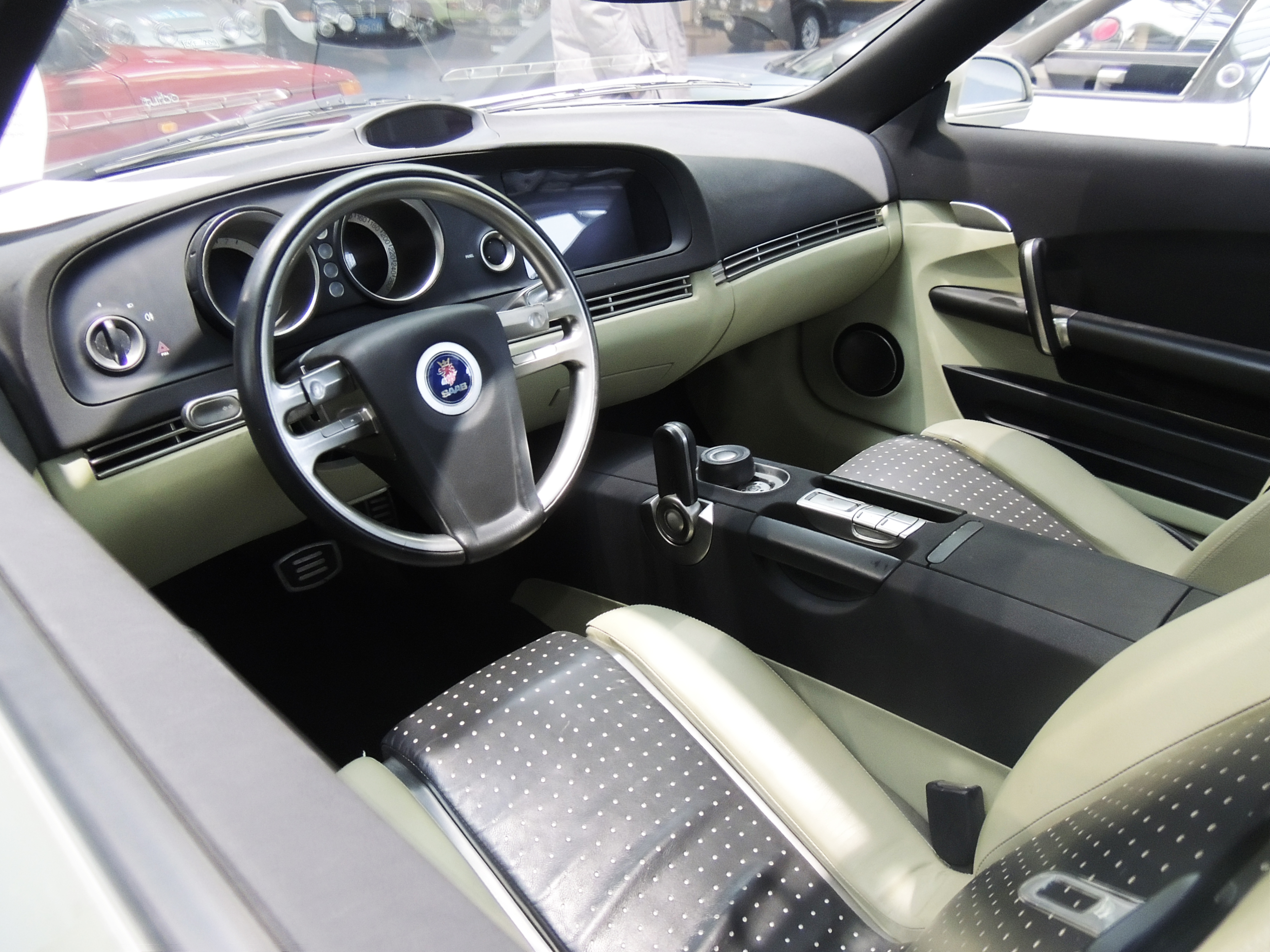 Wnętrze Saaba 93-X